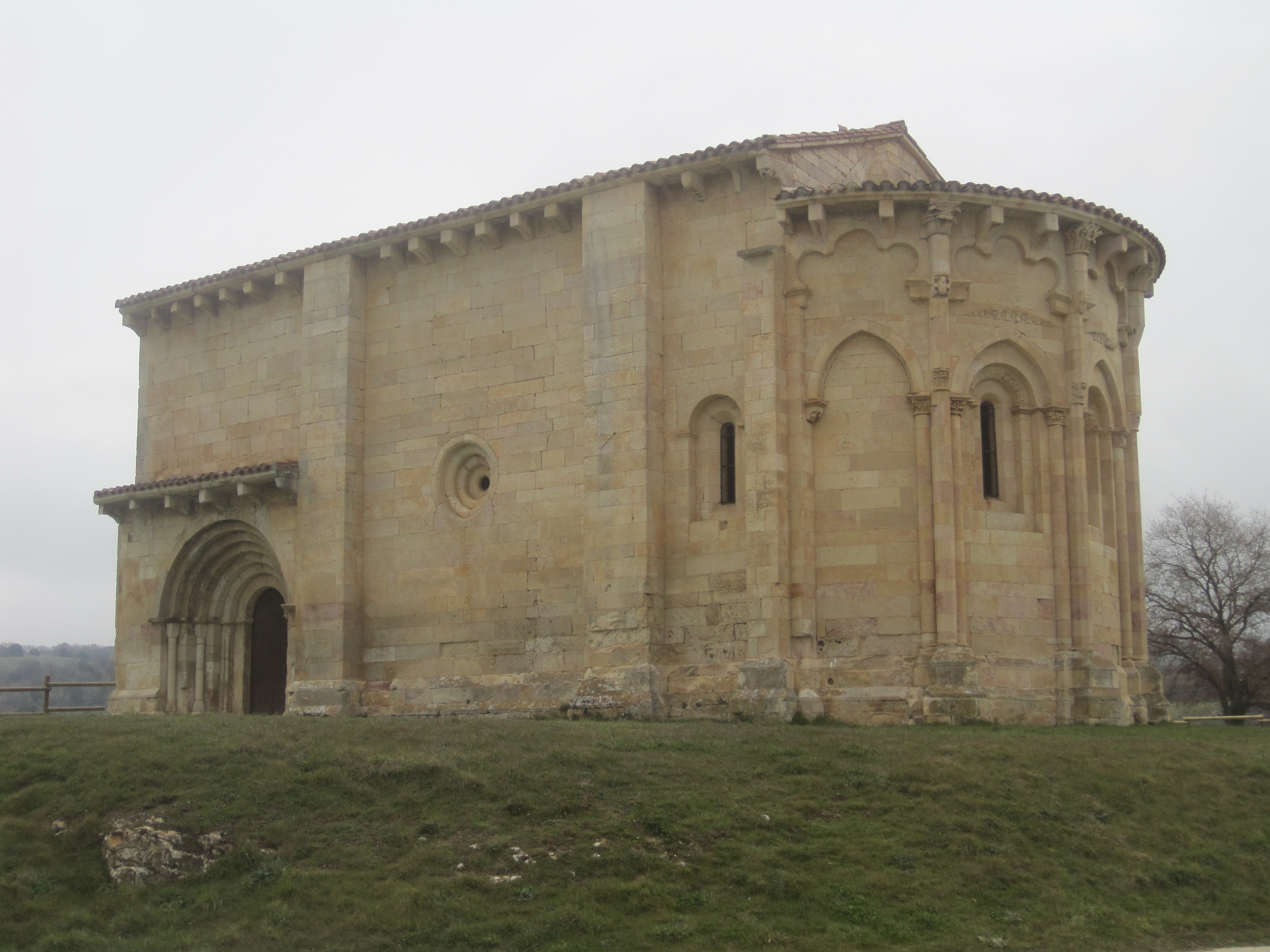 Ermita románica situada en la localidad burgalesa de San Vicentejo, en el Condado de Treviño.